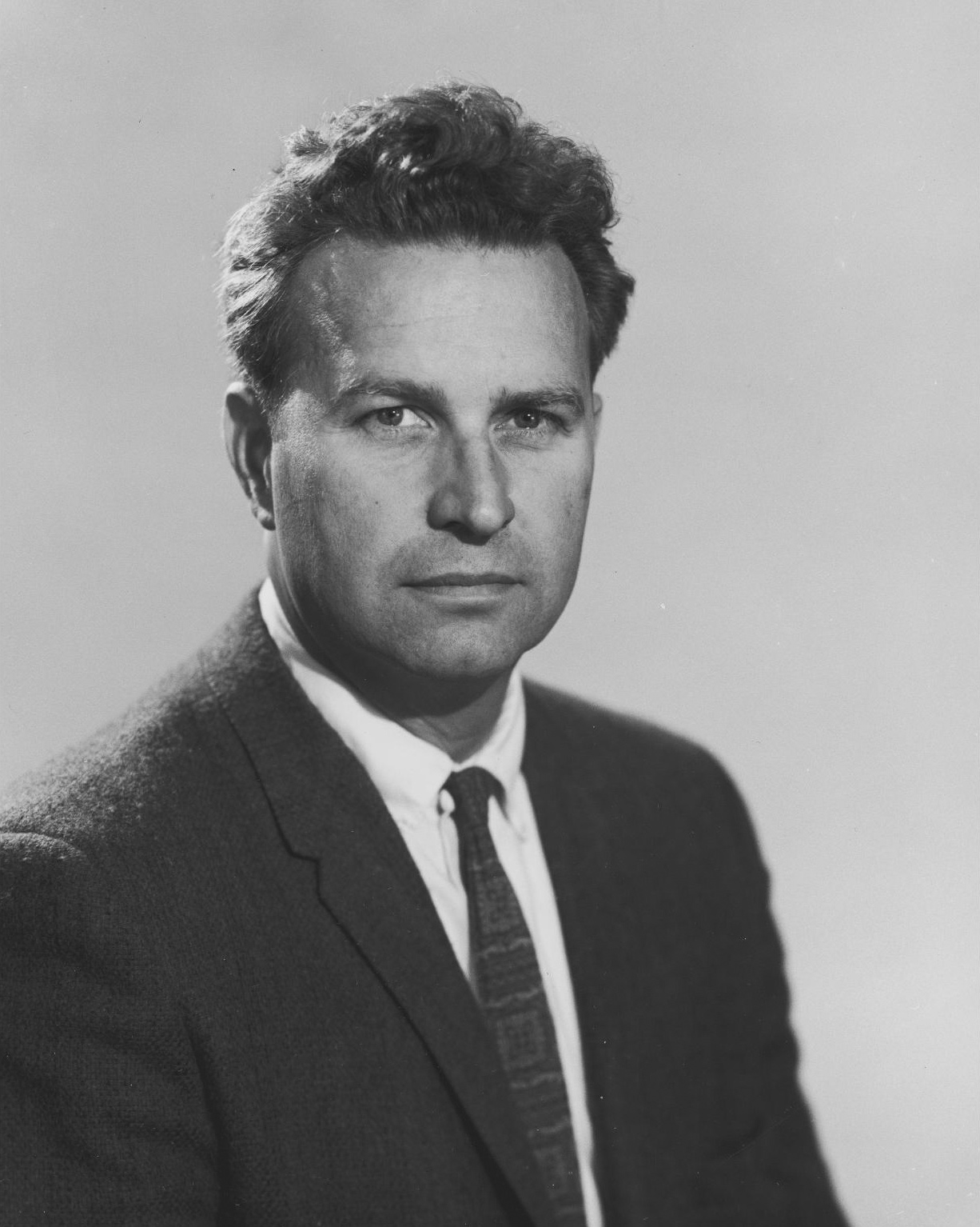 Portrait of Robert Sinclair Dietz (1914-1995), US Geologist.